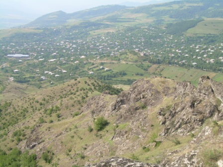 вид на село Севкар